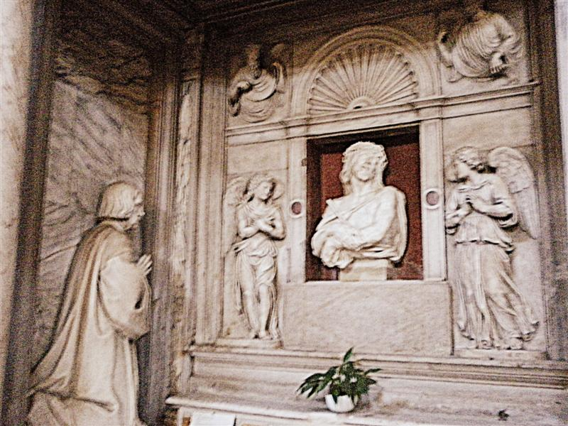 La pietà del Parodi nella chiesa di San Francesco Grande a Padova